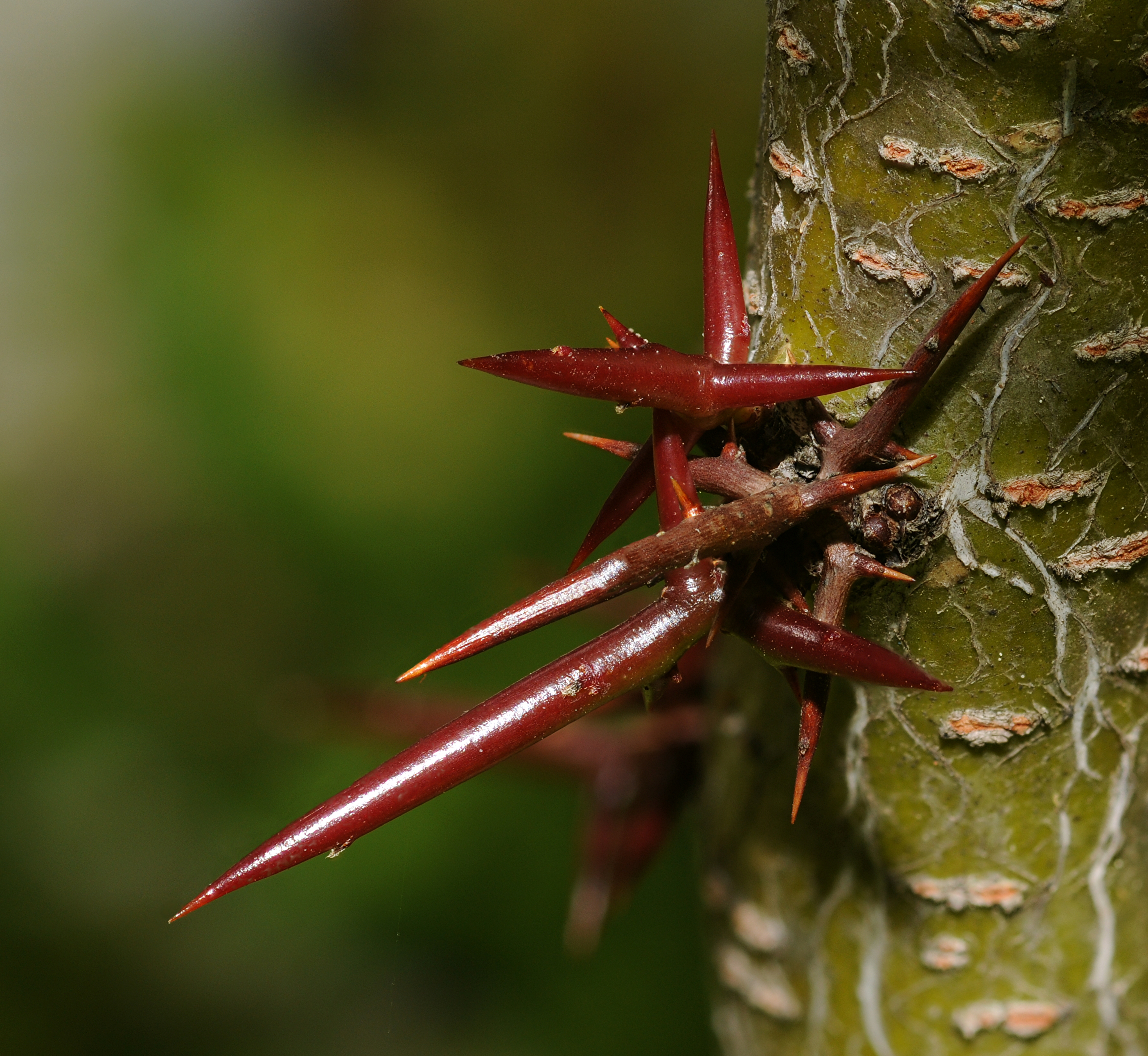 Épines de févier d'Amérique (Gleditsia triacanthos) (focus stacking). Image composée de 25 photos assemblées avec CombineZP. This photograph was taken with a Nikon D300 This image was created with CombineZP.